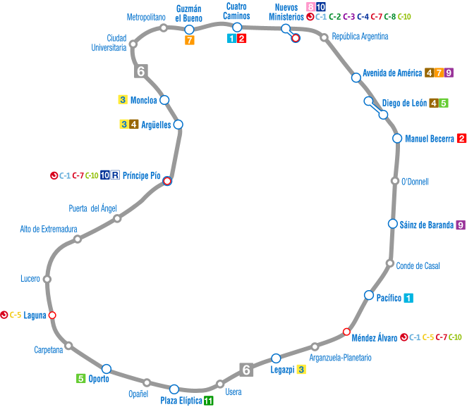 Recorrido de la línea 6 del Metro de Madrid